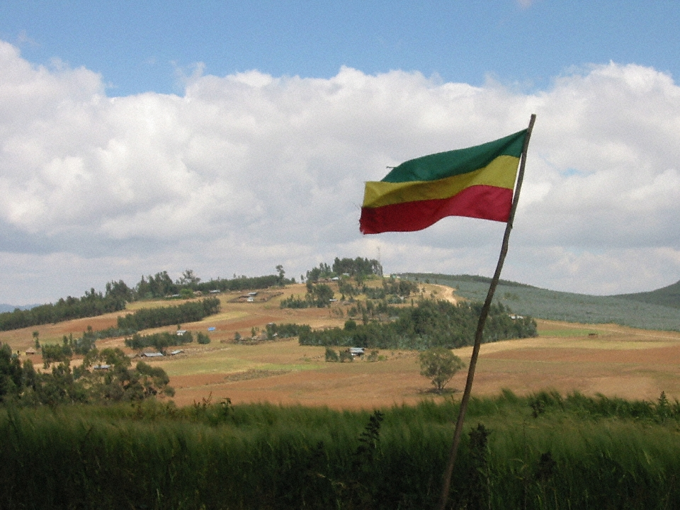 Auf dem Gipfel des Mount Entoto bei Addis Abeba.